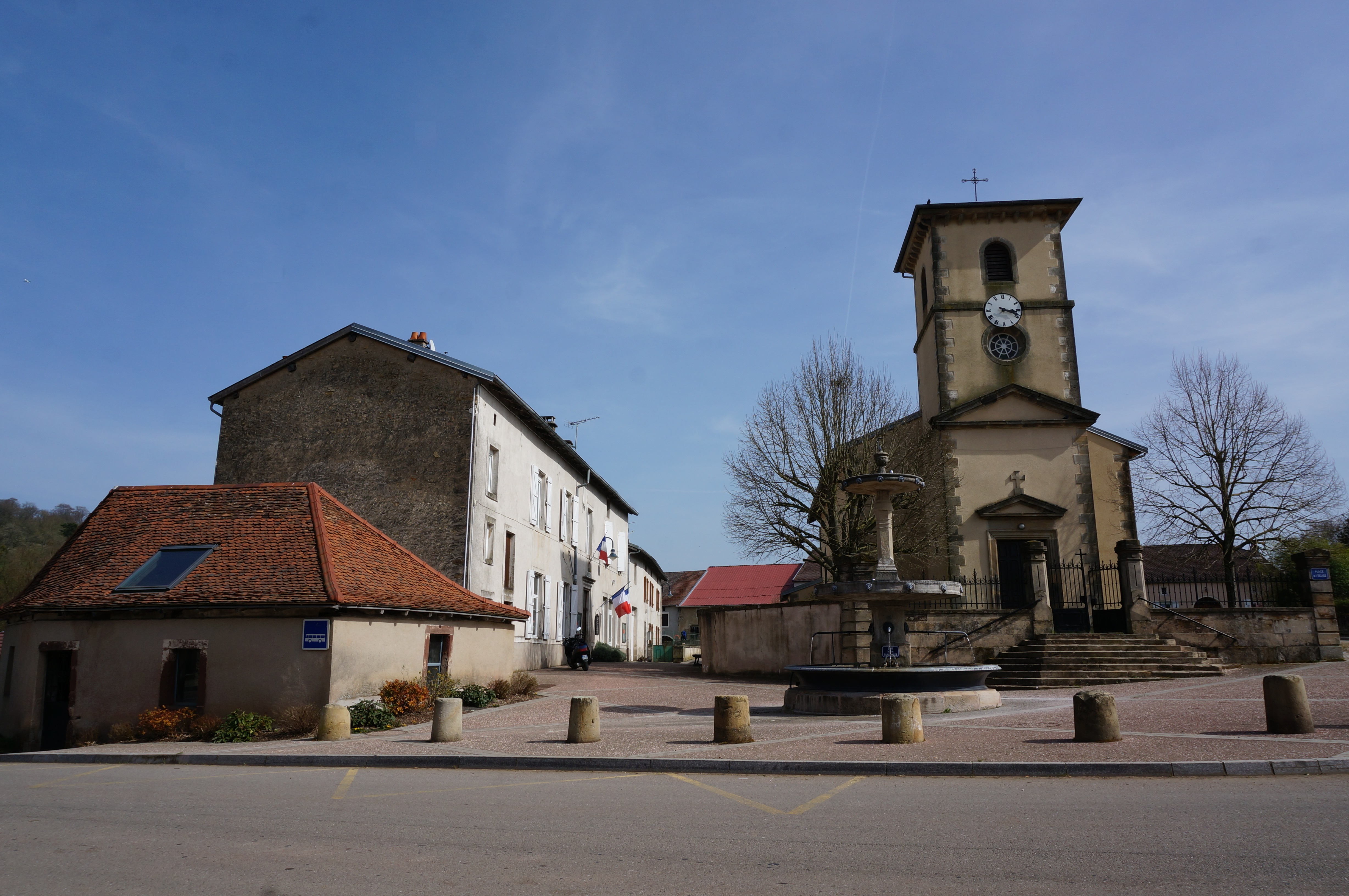 Vue de Bazegney.